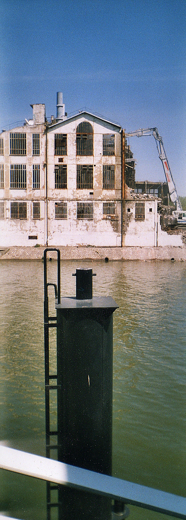 demolition du site